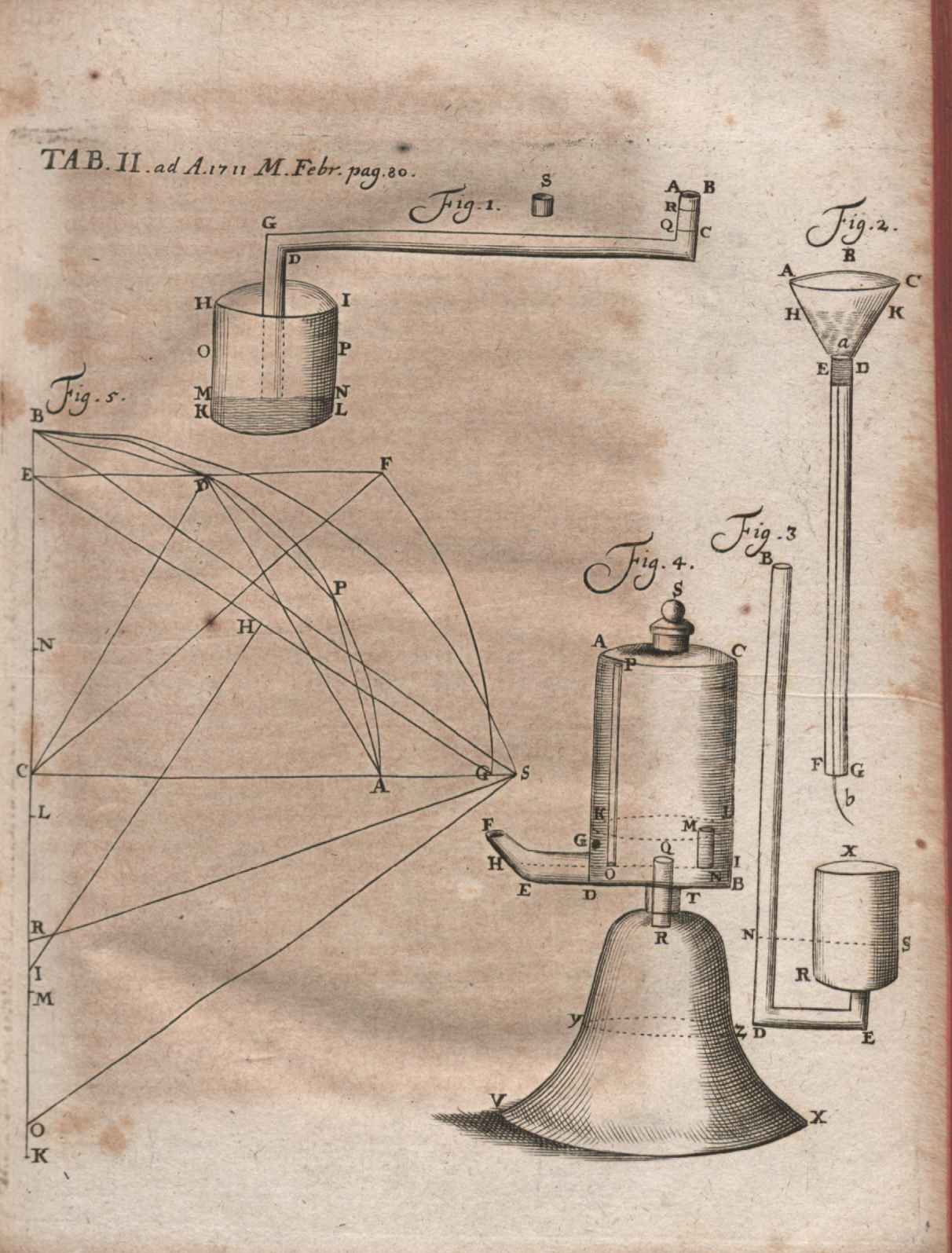 Illustration